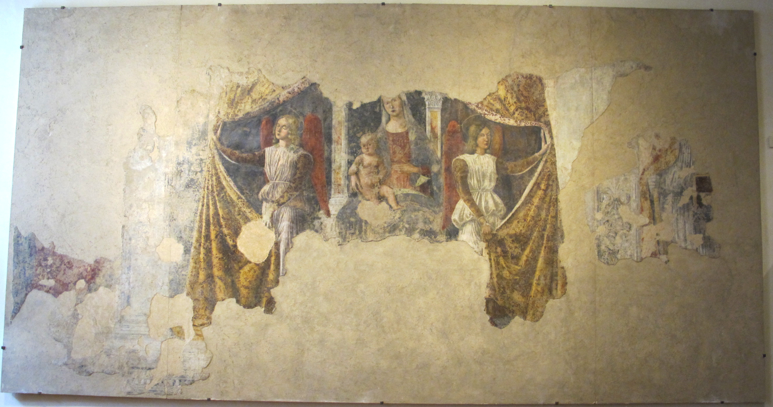 Museo Nazionale d'Arte Medievale e Moderna - MIBAC This is a photo of a monument which is part of cultural heritage of Italy.